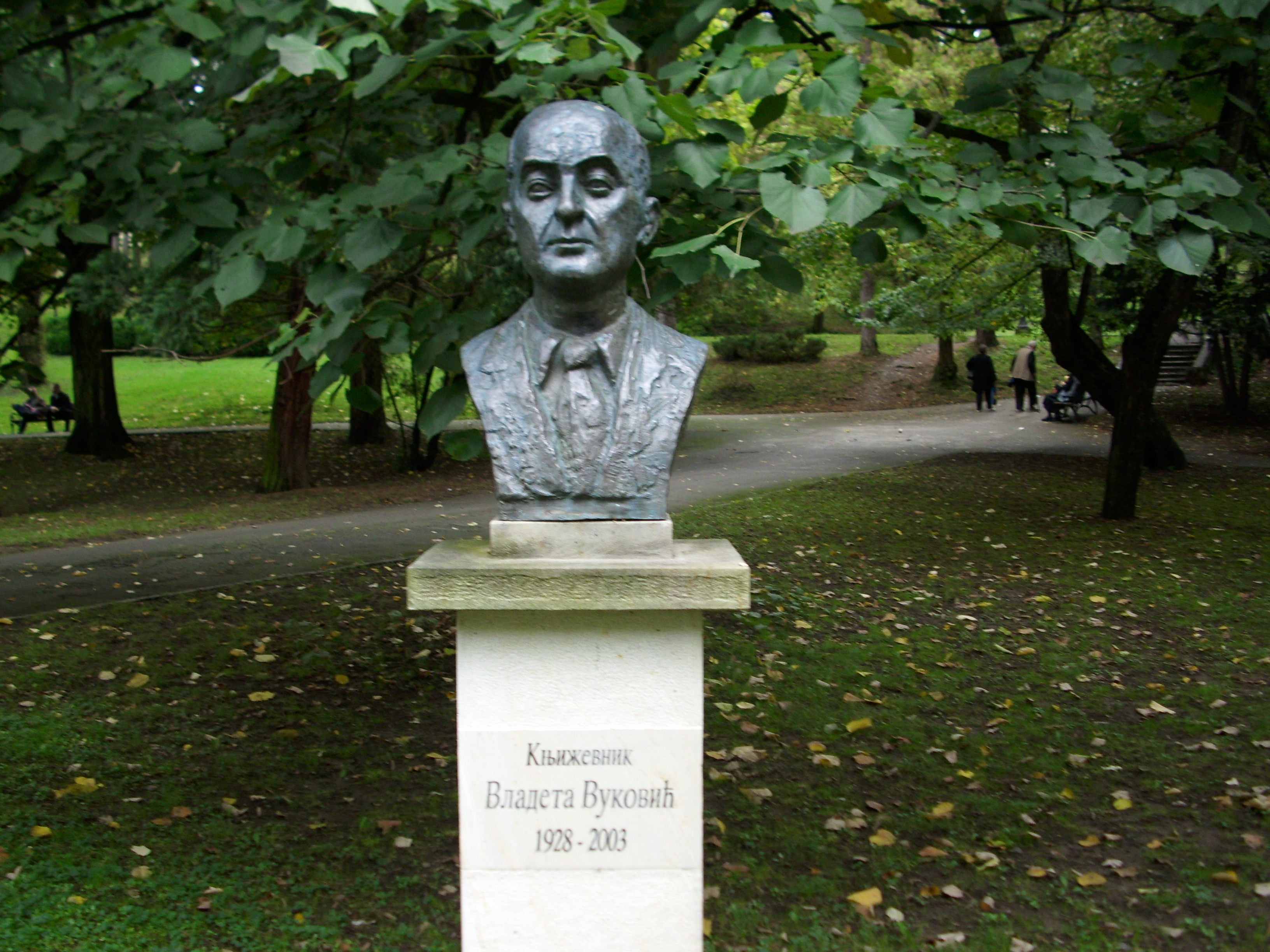 Споменик Владети Вуковићу у Врњачкој Бањи